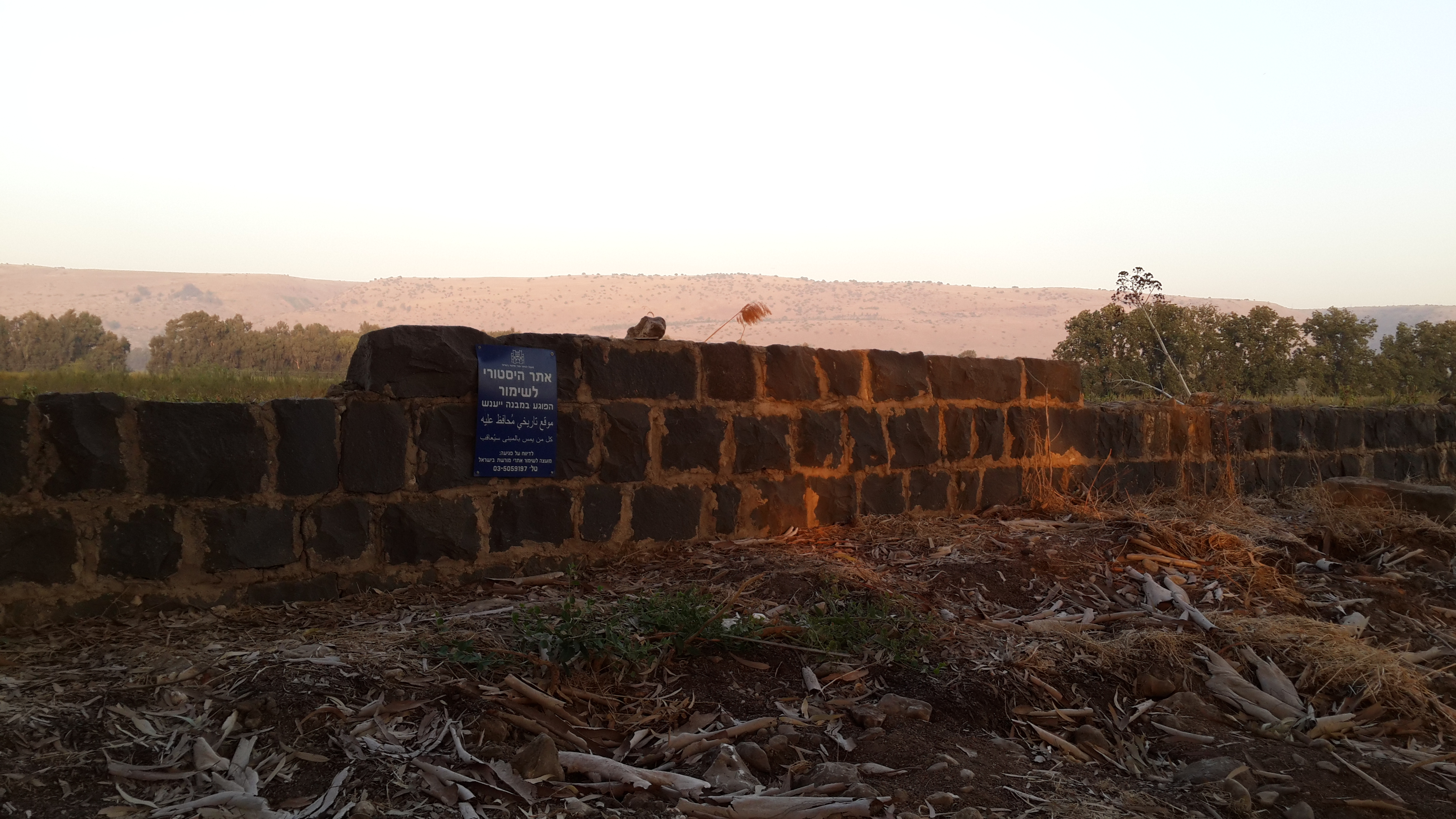 יסוד המעלה נוסדה בשנת 1883 של שפתו הדרום-מערבית של אגם החולה והייתה מן המושבות הראשונות שהוקמו על ידי אנשי העלייה הראשונה, והמושבה השנייה שהוקמה בגליל העליון לאחר ראש פינה.